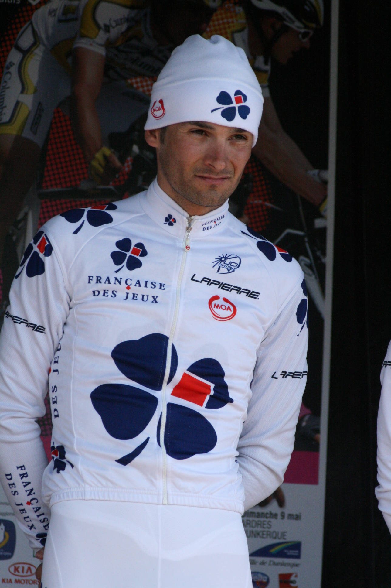 Benoît Vaugrenard, lors de la présentation des équipes des 4 jours de Dunkerque 2010